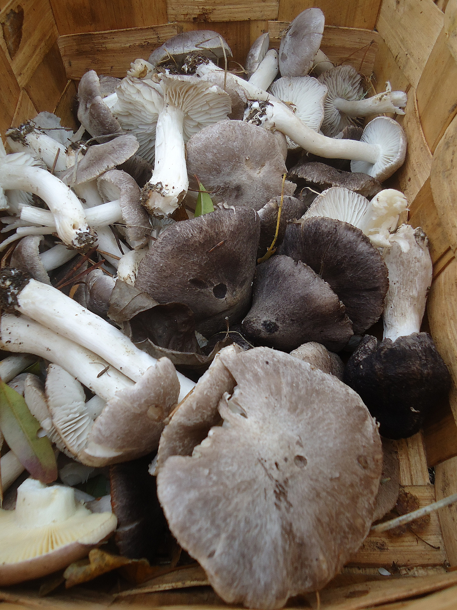 Ziza arrea, Araban bildua